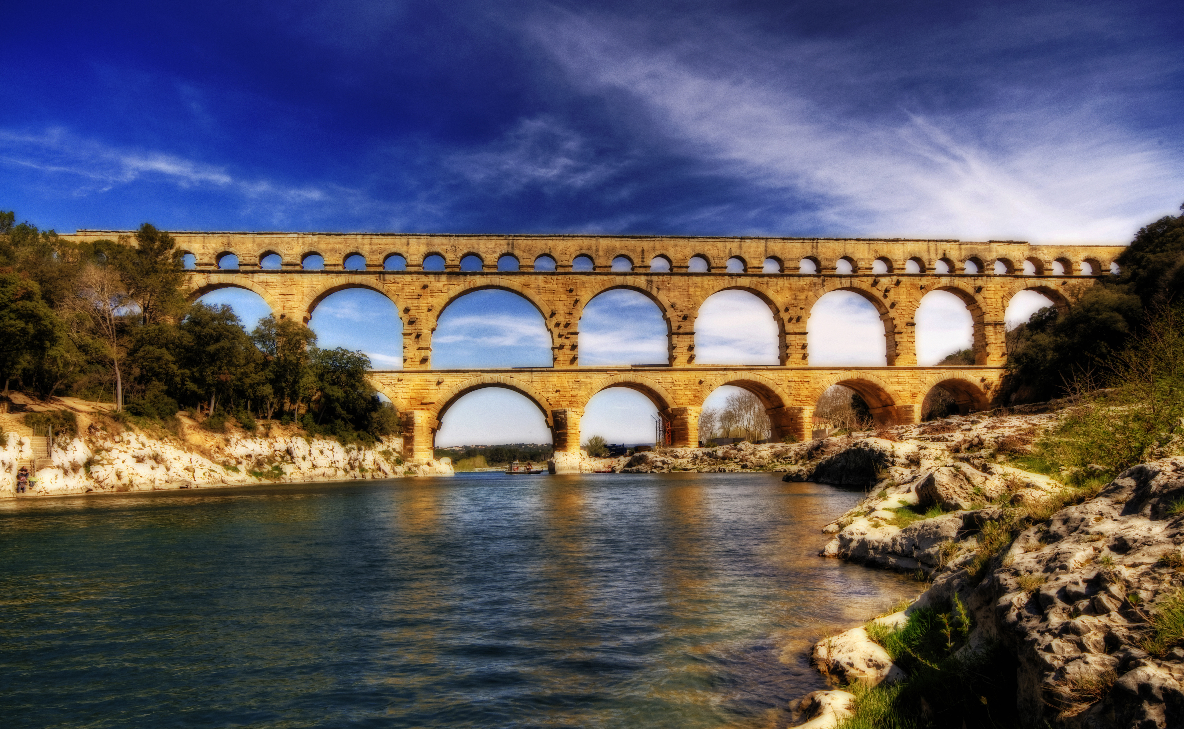 Le Pont du Gard est une portion d'aqueduc romain aménagée en pont à trois niveaux situé dans le sud de la France commune de Vers-Pont-du-Gard, près de Remoulins, Nîmes et Uzès, dans le département du Gard. Il enjambe le Gardon, ou Gard, et assure la continuité de l'aqueduc romain qui conduisait l’eau d’Uzès à Nîmes.